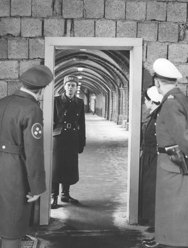 Berlin (West) Sektorenübergang Oberbaumbrücke Posten am Durchbruch.